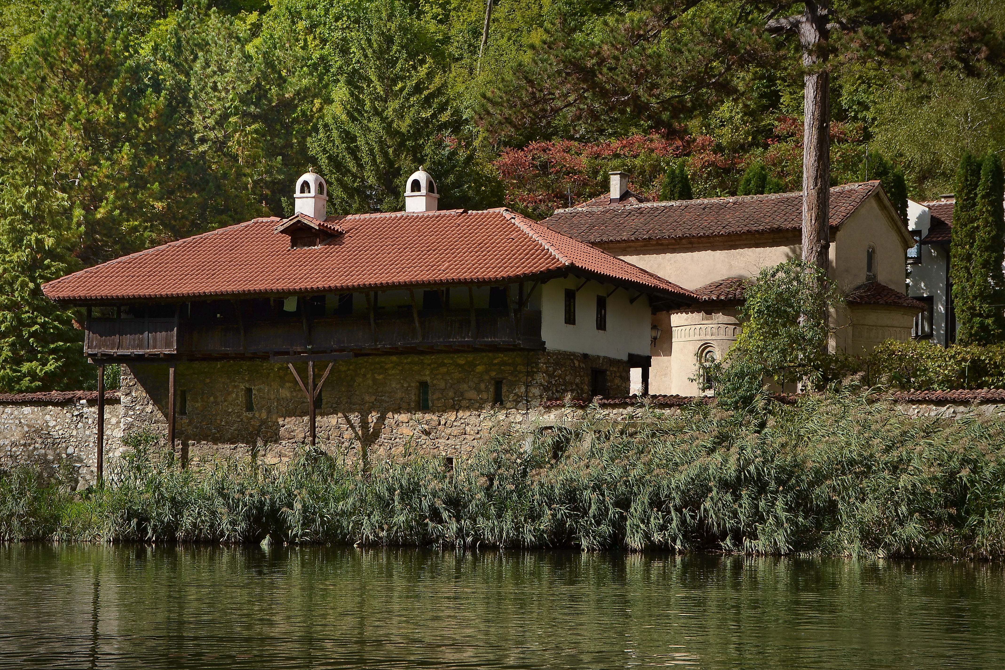 Манастир је највероватније основан крајем 14. века или почетком 15. века. Обнављан је у више наврата.